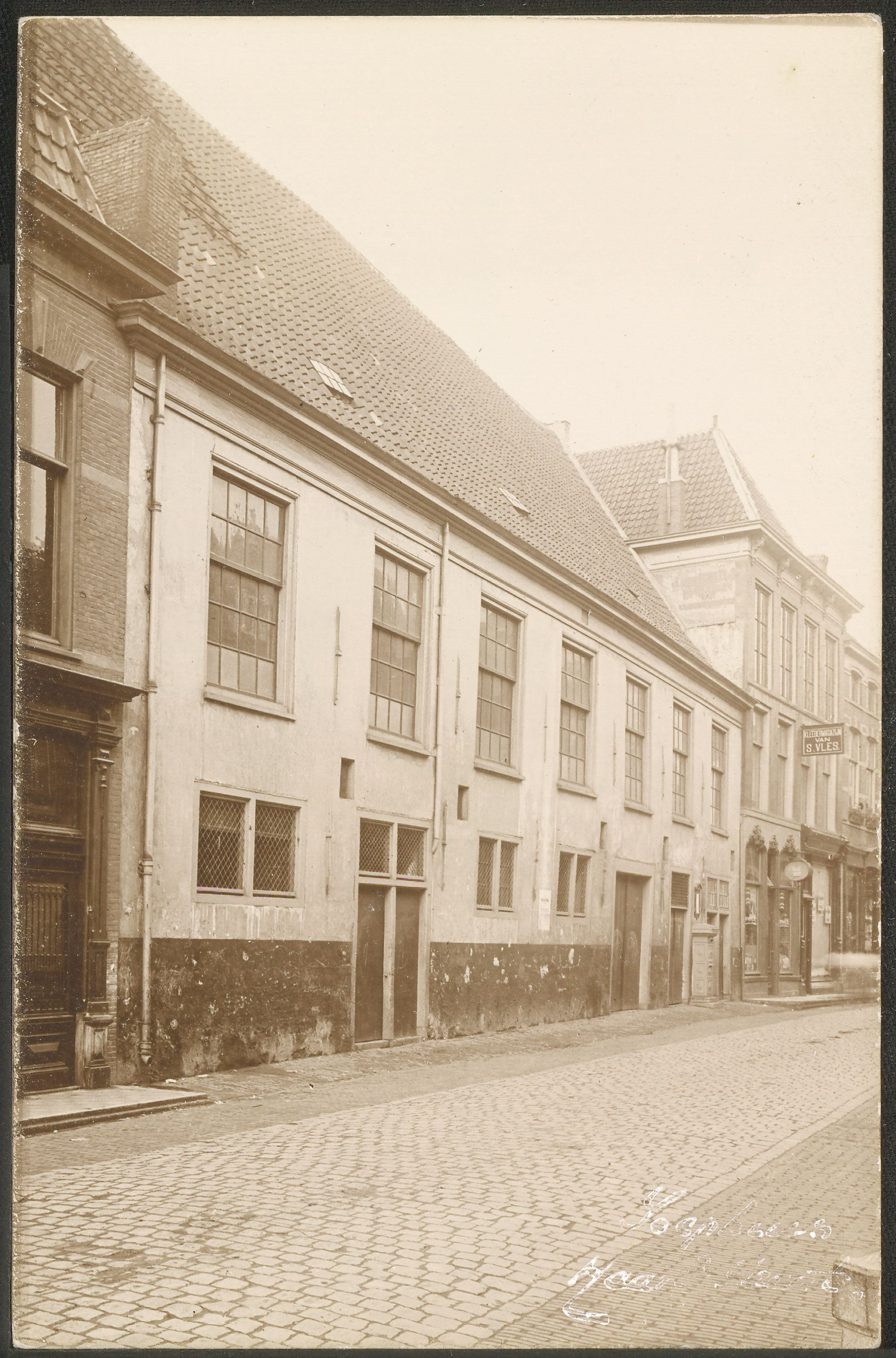 Gezicht op Haarlemmerstraat 165